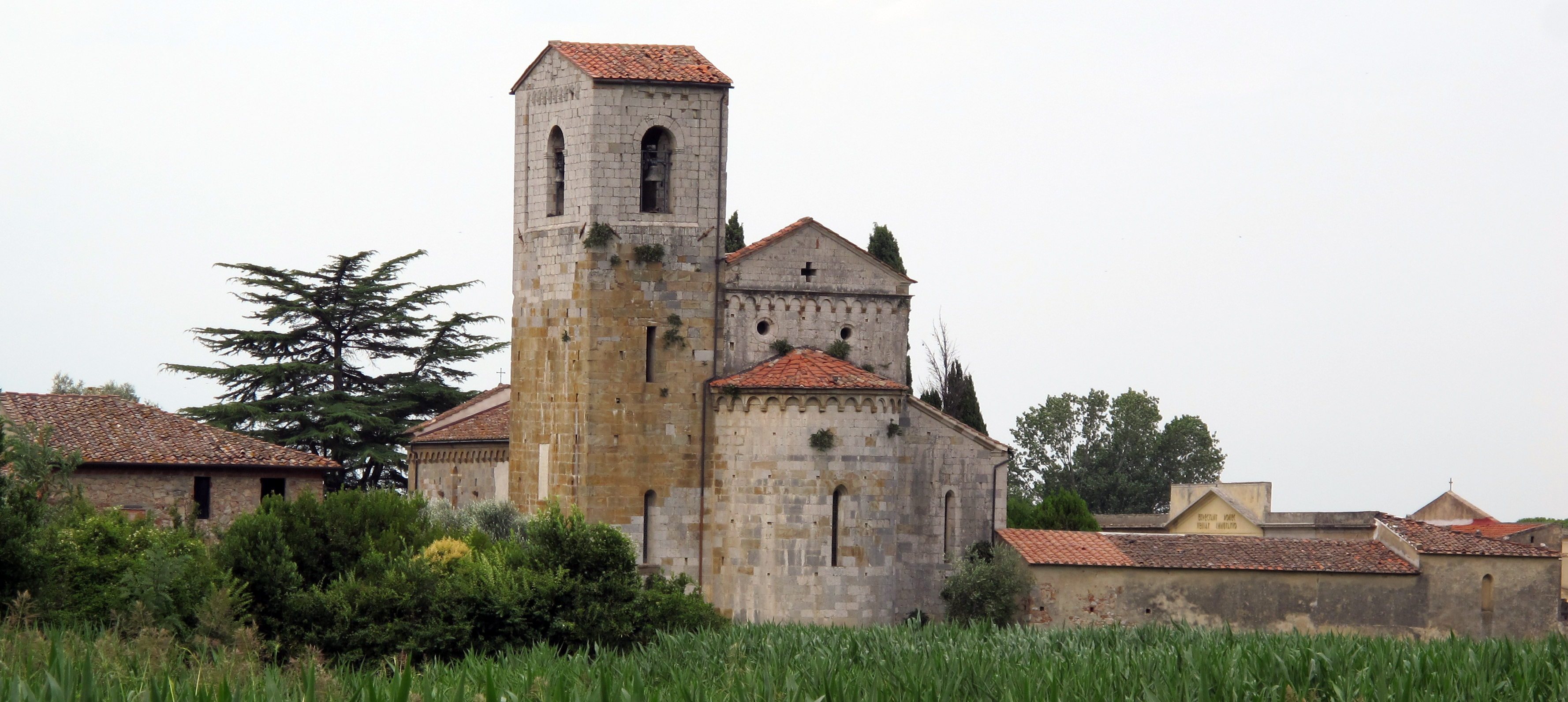 Caprona, Vicopisano, Pisa, Toscana, Italia